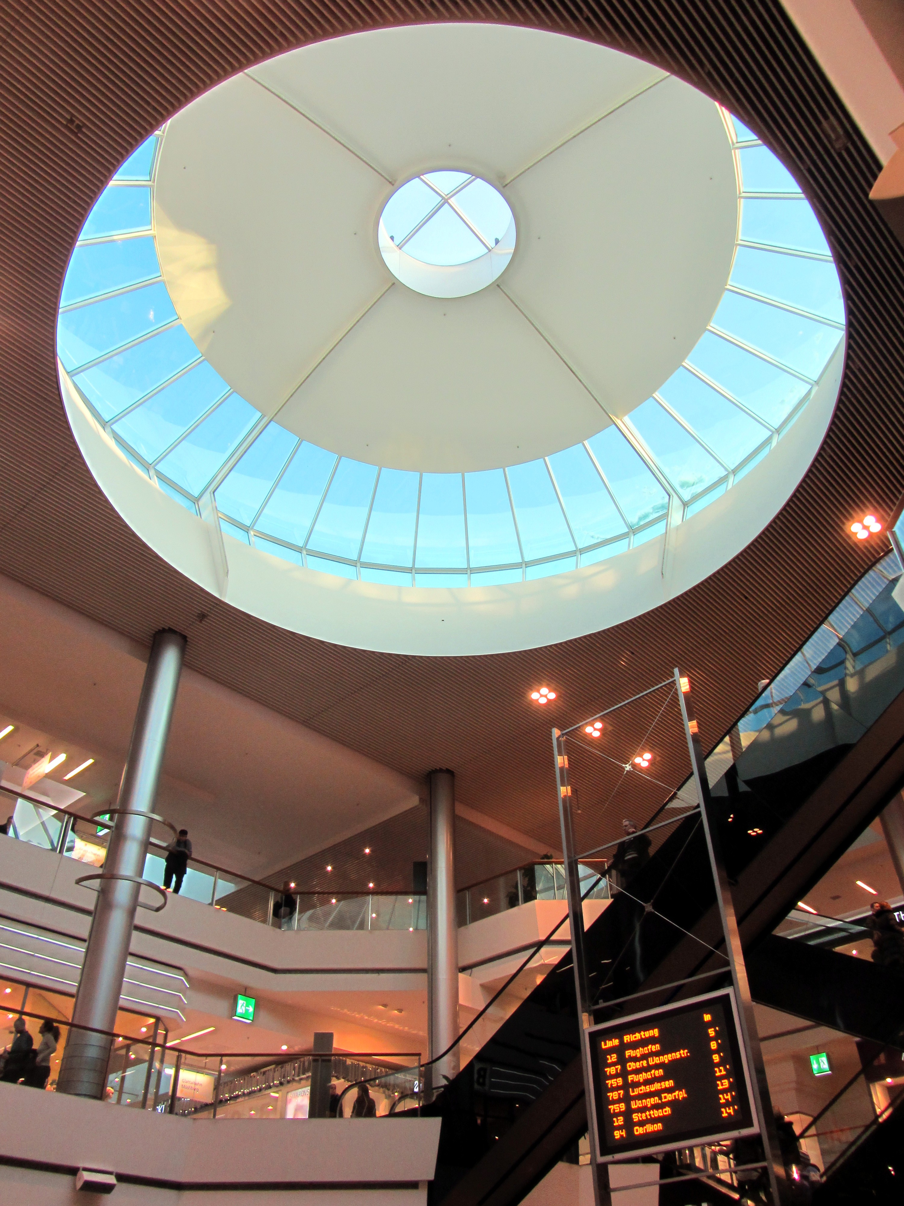 Glattzentrum in Wallisellen (Switzerland)